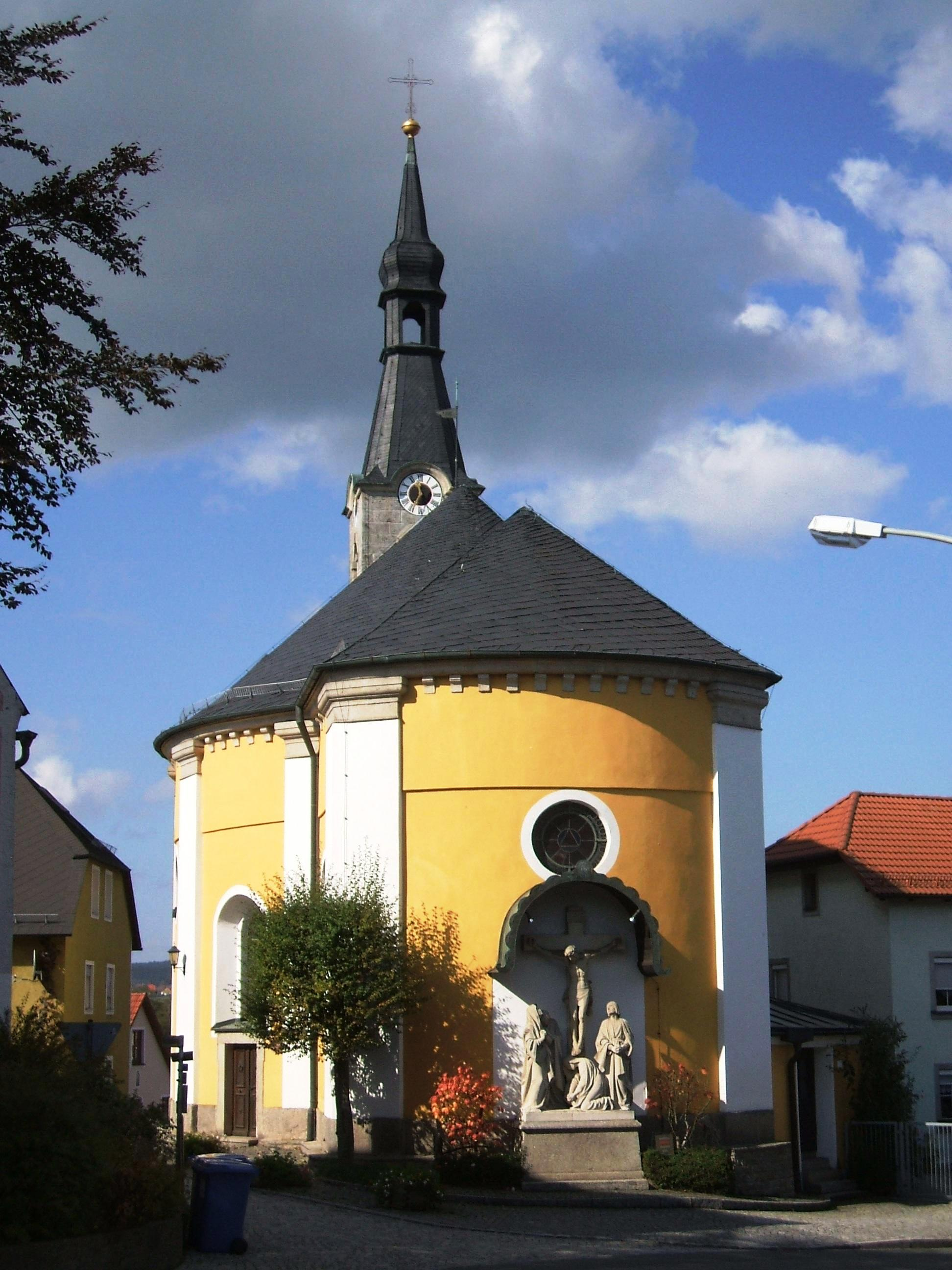 Kath. Filialkirche St. Agatha in Neuhaus, Stadt Windischeschenbach